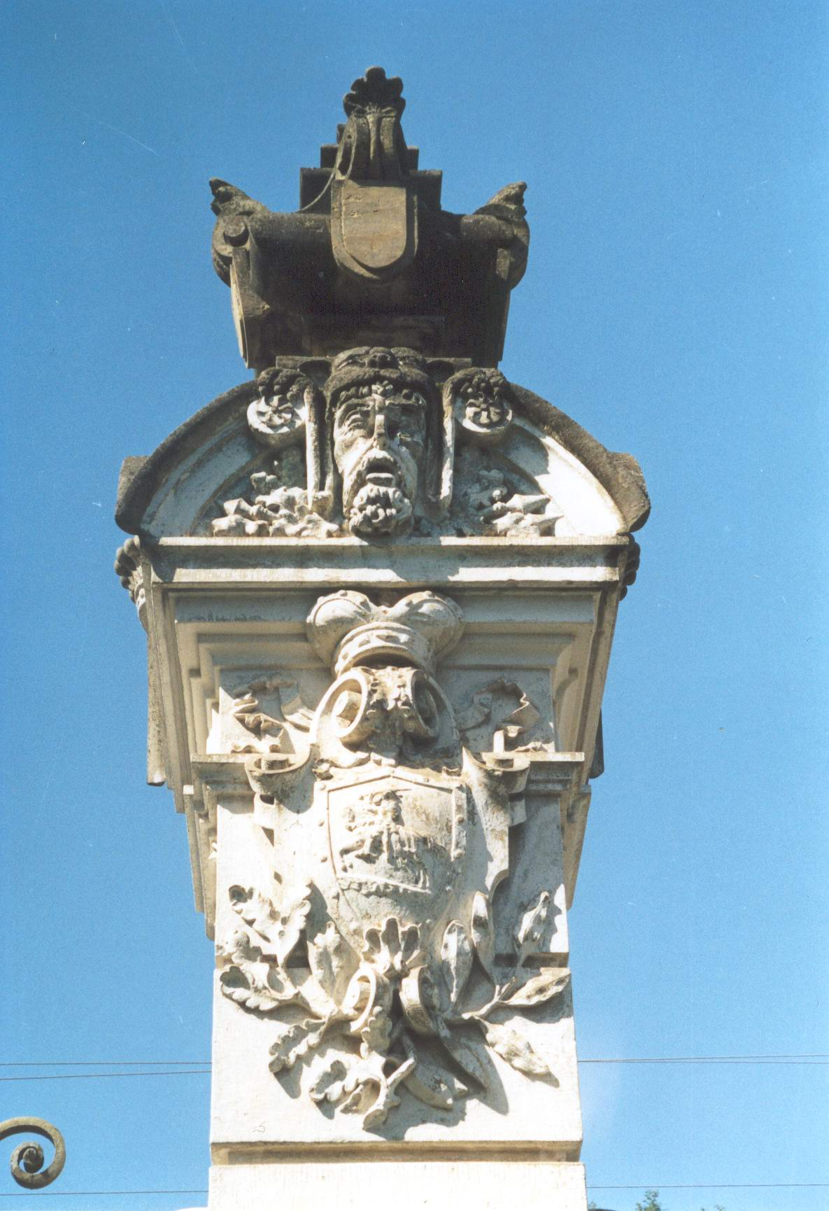 Гербовий рельєф.